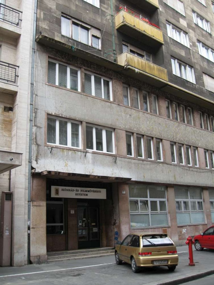 Színház- és Filmművészeti Egyetem (Budapest, VIII. ker., Vas u. 2.)